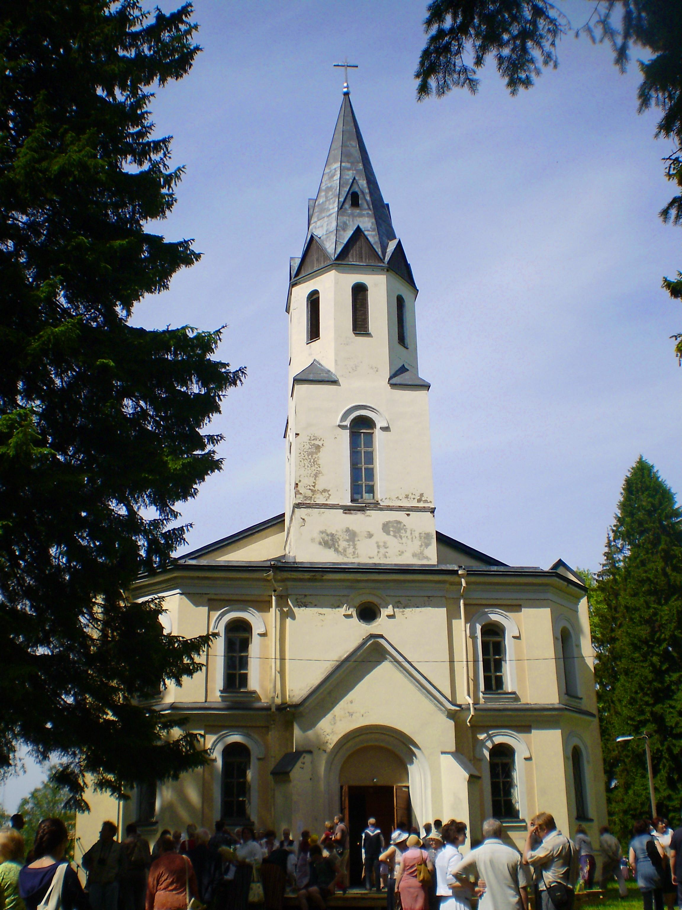 Кирха Св. Петра и Павла в Токсово